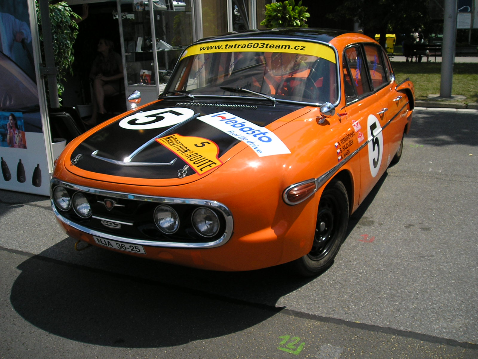 TATRA T2 603 B5 na brněnském autosalonu